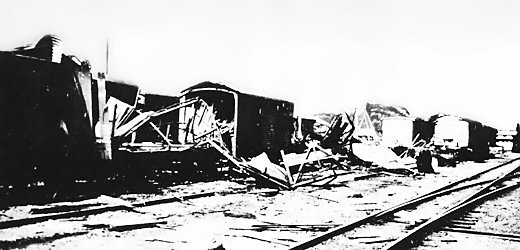 Zerstörungen auf dem Bahnhof von Tarlac nach einem japanischen Bombenangriff (Philippinen - 1941)